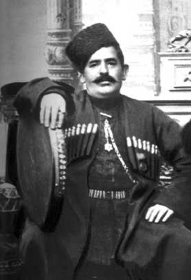 Bulbuljan (Abdulbagi Zulalov)